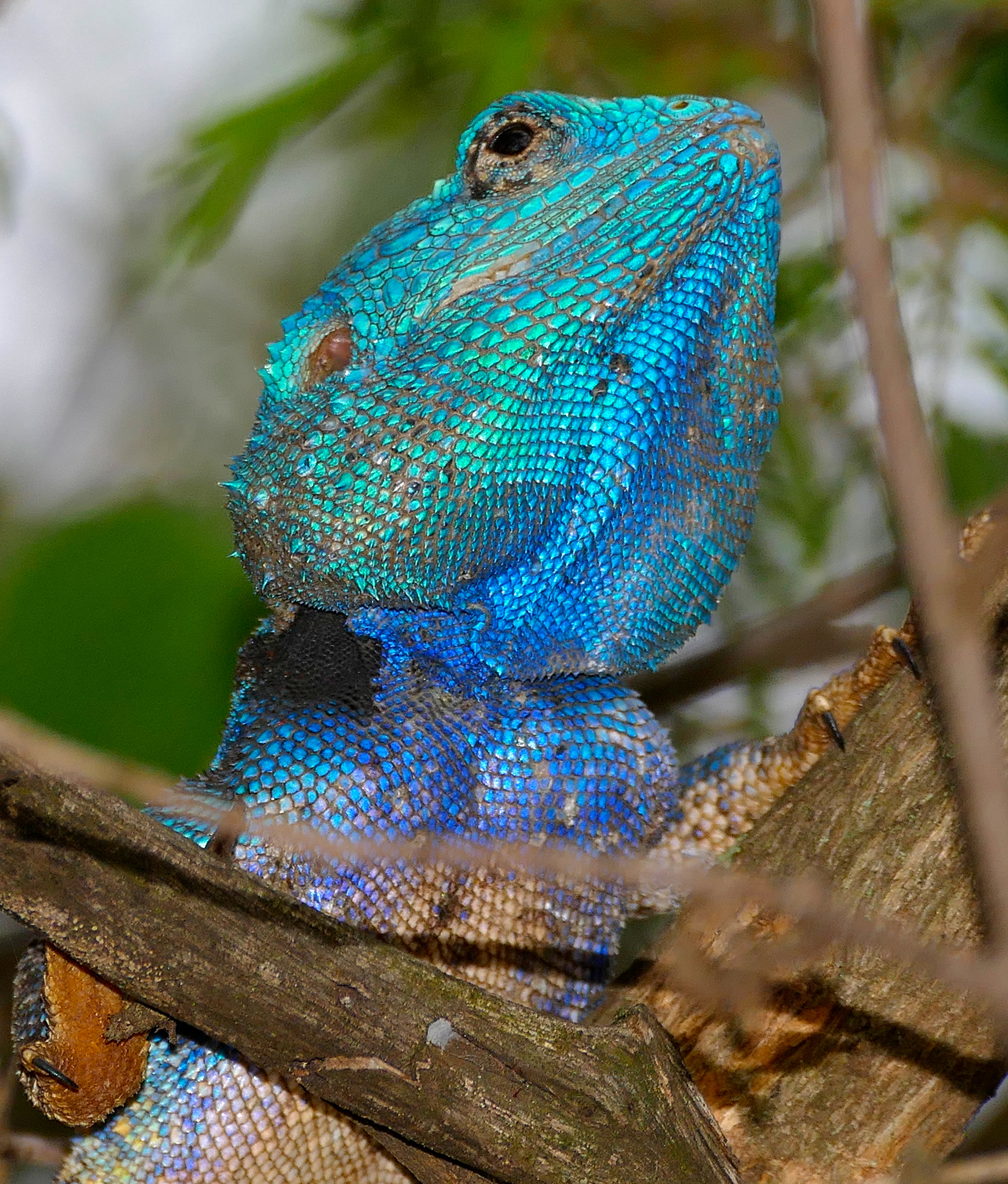 Lower Sabie Camp, Kruger NP, Mpumalanga, SOUTH AFRICA